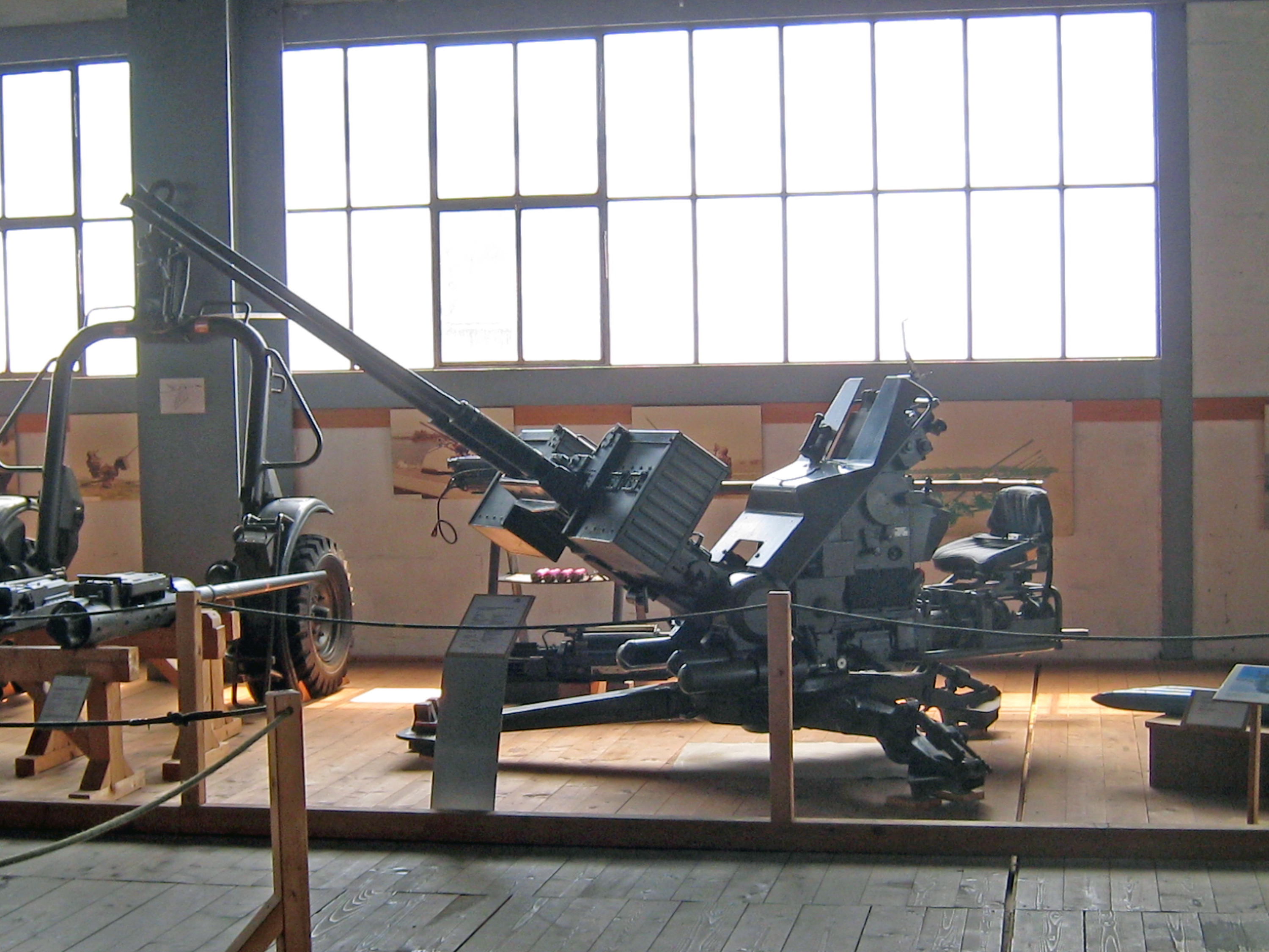 20-mm-Zwillings-Fliegerabwehrgeschütz HS 820 im Militärmuseum Full